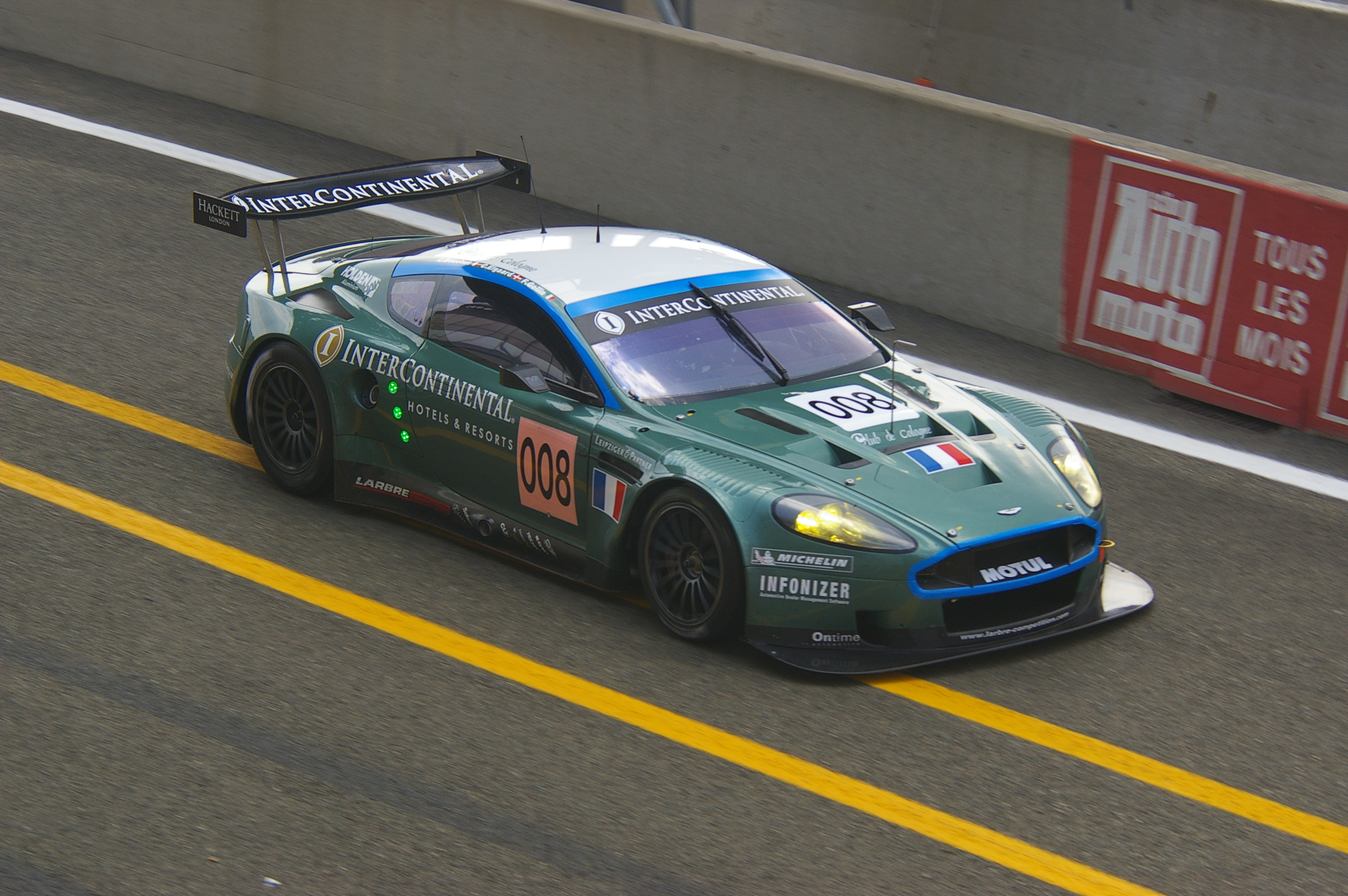 Entrée dans les stands de l'Aston Martin DBR9 de l'équipage 008 (Christophe Bouchut, Fabrizio Gollin et Casper Elgaard) lors de la journée test des 24h du Mans du 03 juin 2007.